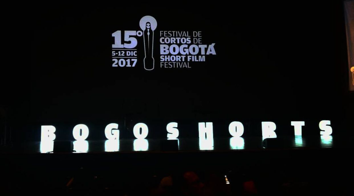 Bogoshorts edición 15